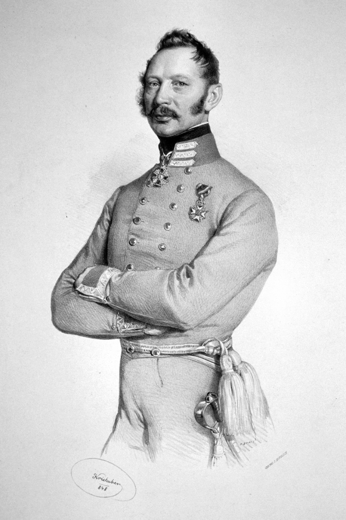 Sebastian Frank von Seewies (1796-1850), k. k. Generalmajor, Stadtkommandant von Wien. Lithographie von Josef Kriehuber, 1848